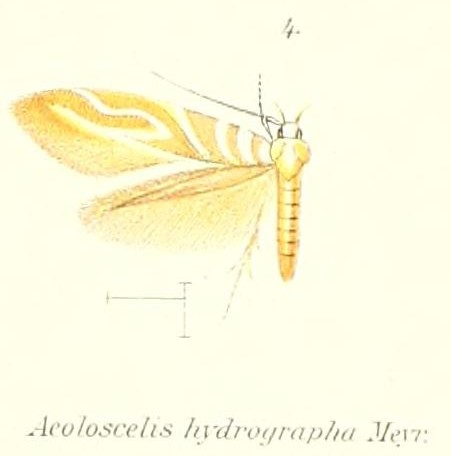 Isorrhoa aetheria